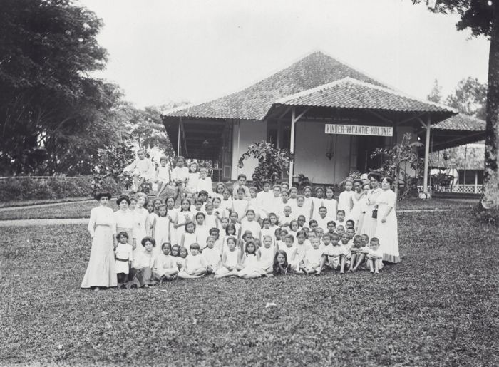 Foto. Groepsportret voor de Kindervakantiekolonie in Soekaboemi